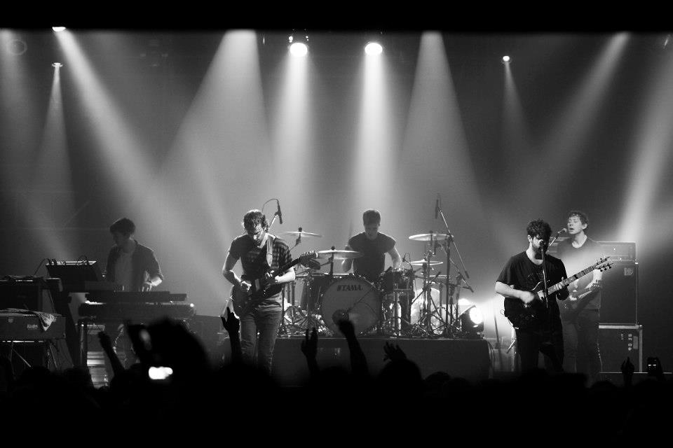 Foals en Buenos Aires, Argentina, 2 de abril de 2013.